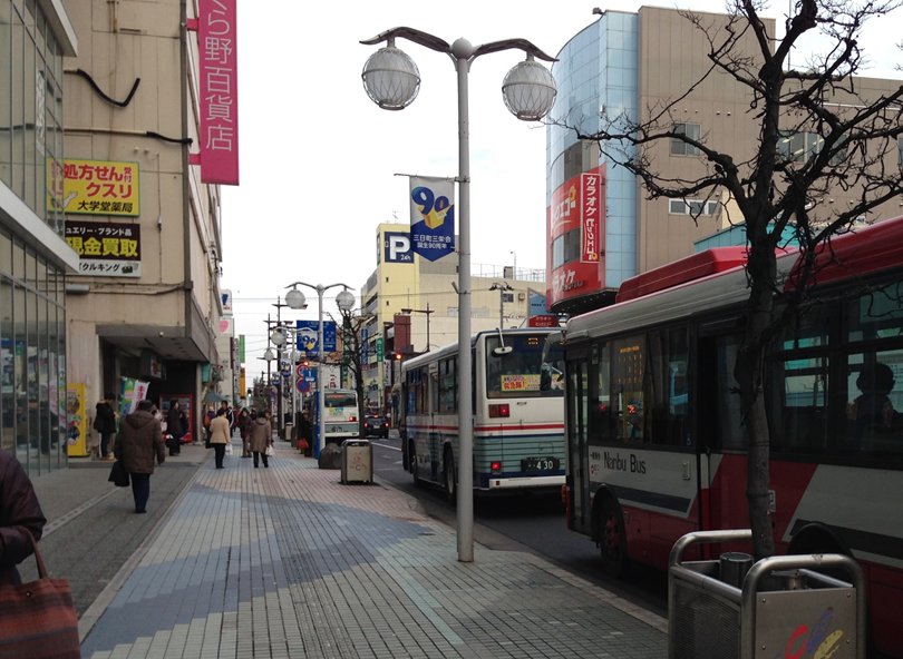 八戸中心街ターミナル1番のりば(三日町)と八戸市中心街表通りの様子